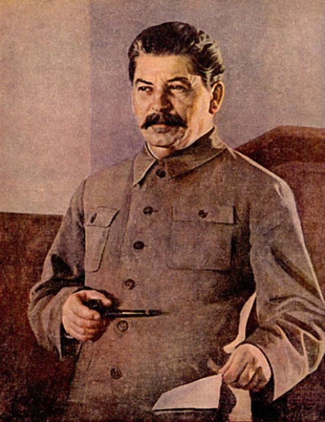 Stalin